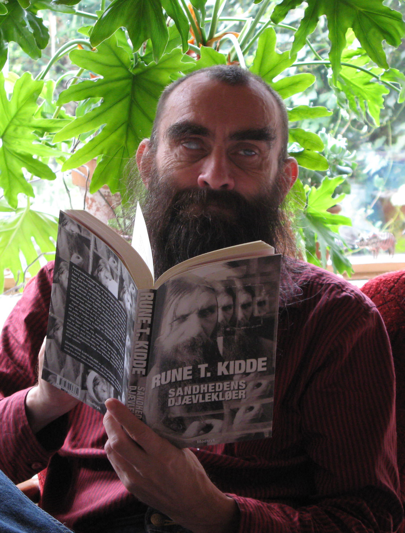 The Danish author Rune T. Kidde, 2012